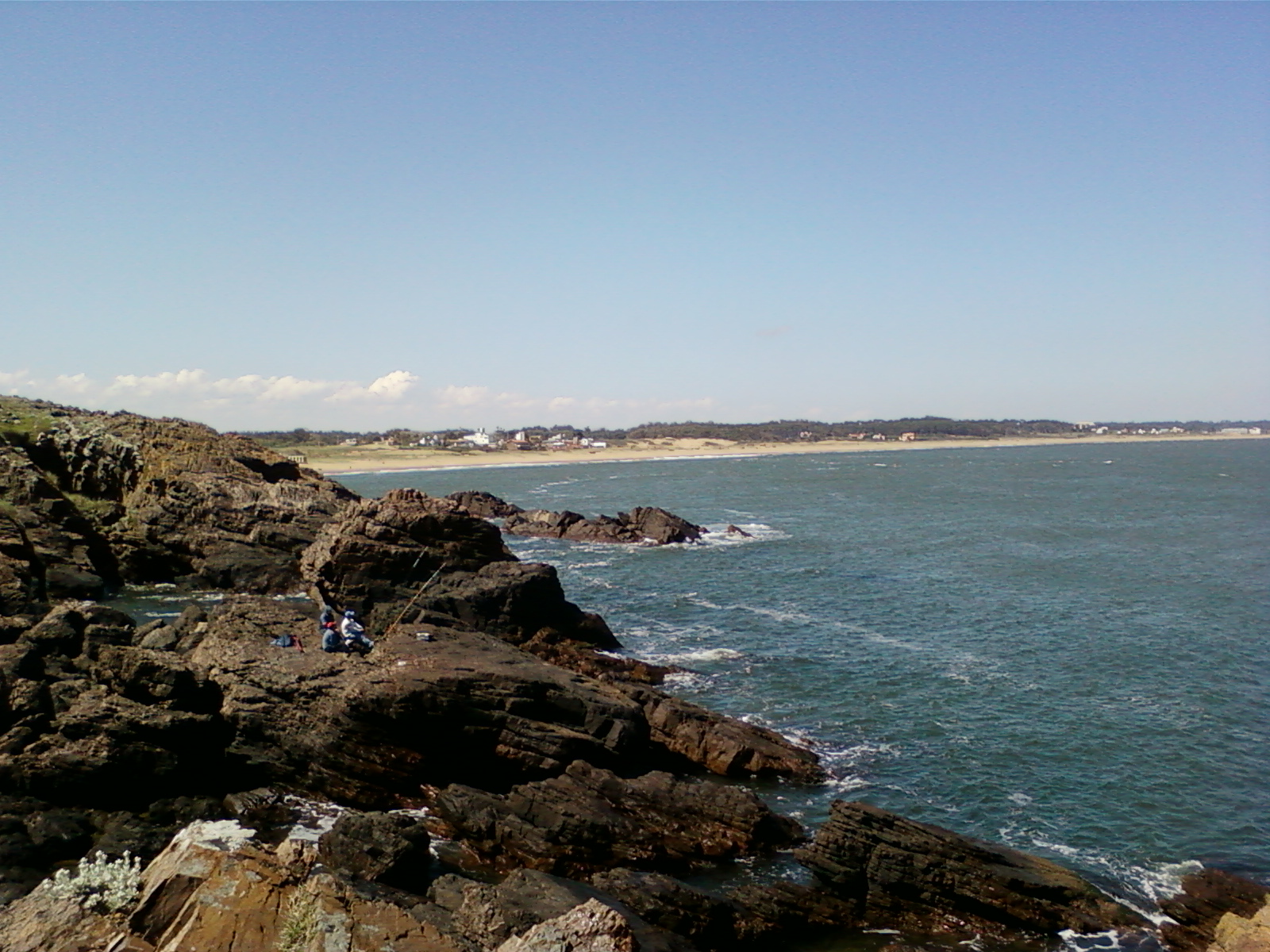 20003 Punta Ballena, Maldonado Department, Uruguay